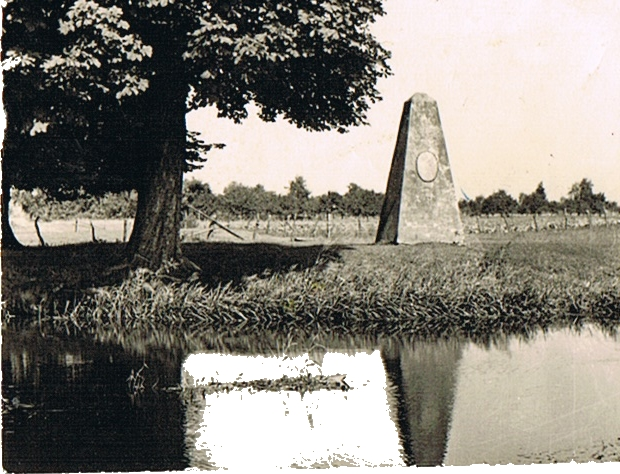 Der verschwundene Obelisk, den Christian Karl Wilhelm von Katte an der Stremme in Neuenklitsche aufstellen ließ mit der Inschrift: „Im Jahre 1780 ließ Friedrich der Zweite, König von Preußen, diesen Fluss verbreitern und die Brücher urbar machen. Chr. Karl Wilhelm von Katte.“